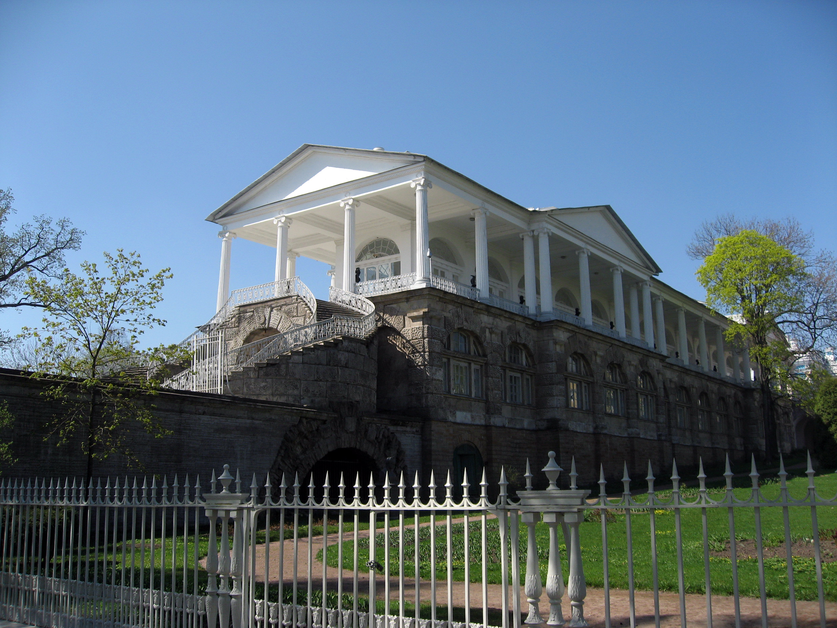 Kateřinský palác